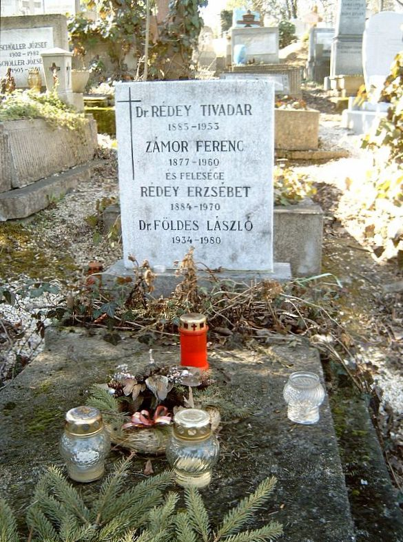 Földes László (Szászváros, 1934 – Bp., 1980) etnográfus - Rédey Tivadar (Bp., 1885 – Bp., 1953) könyvtáros, irodalomtörténész - Zámor Ferenc, Zsabokrszky (Bazin, 1877 – Bp., 1960) gépészmérnök és felesége Rédey Erzsébet sírja Budapesten. Farkasréti temető: 21/2-1-78.